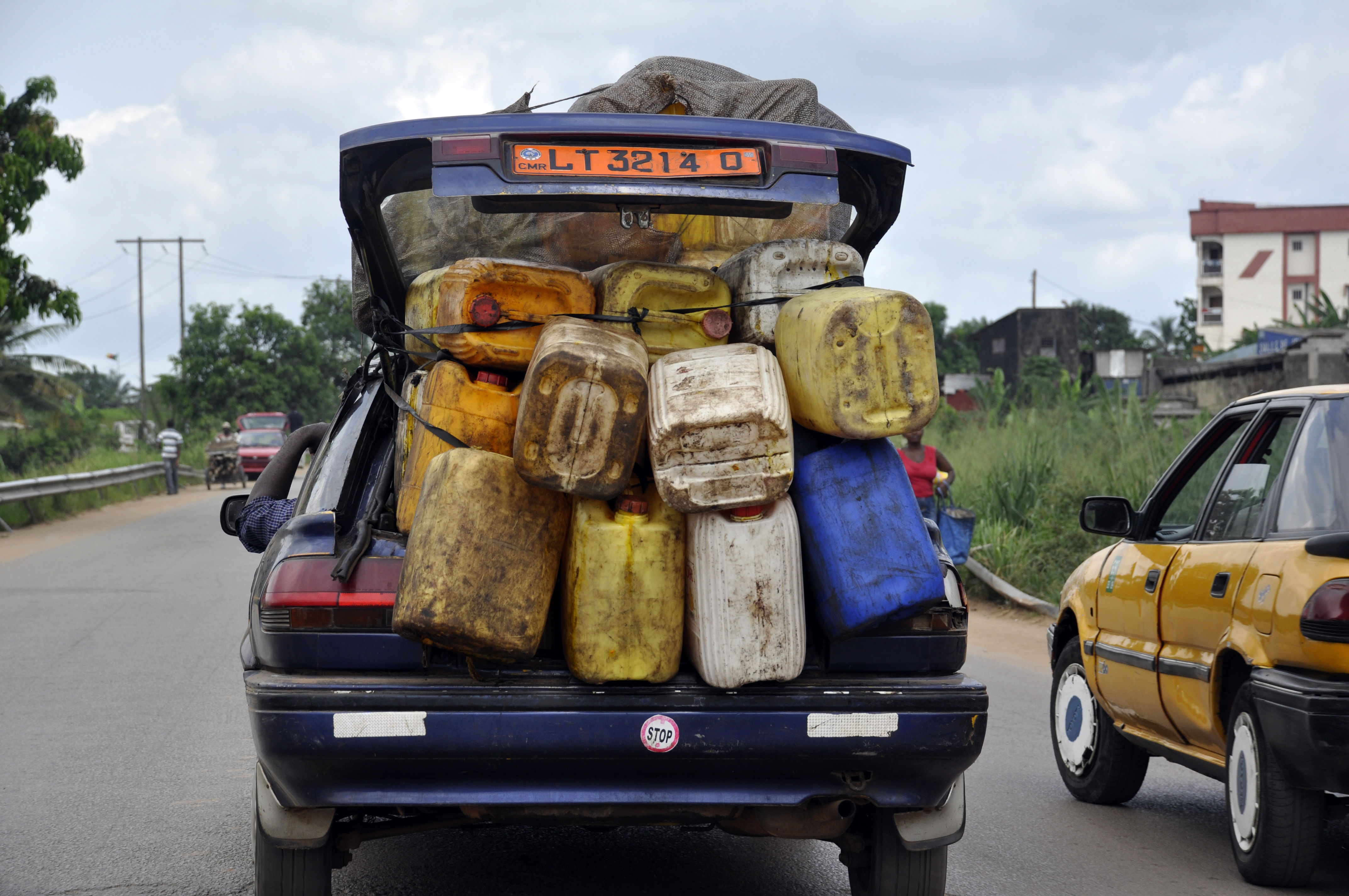 Un véhicule transportant les bidons à Mbanga au Cameroun. This is an image with the theme "Africa on the Move or Transport" from: Cameroon